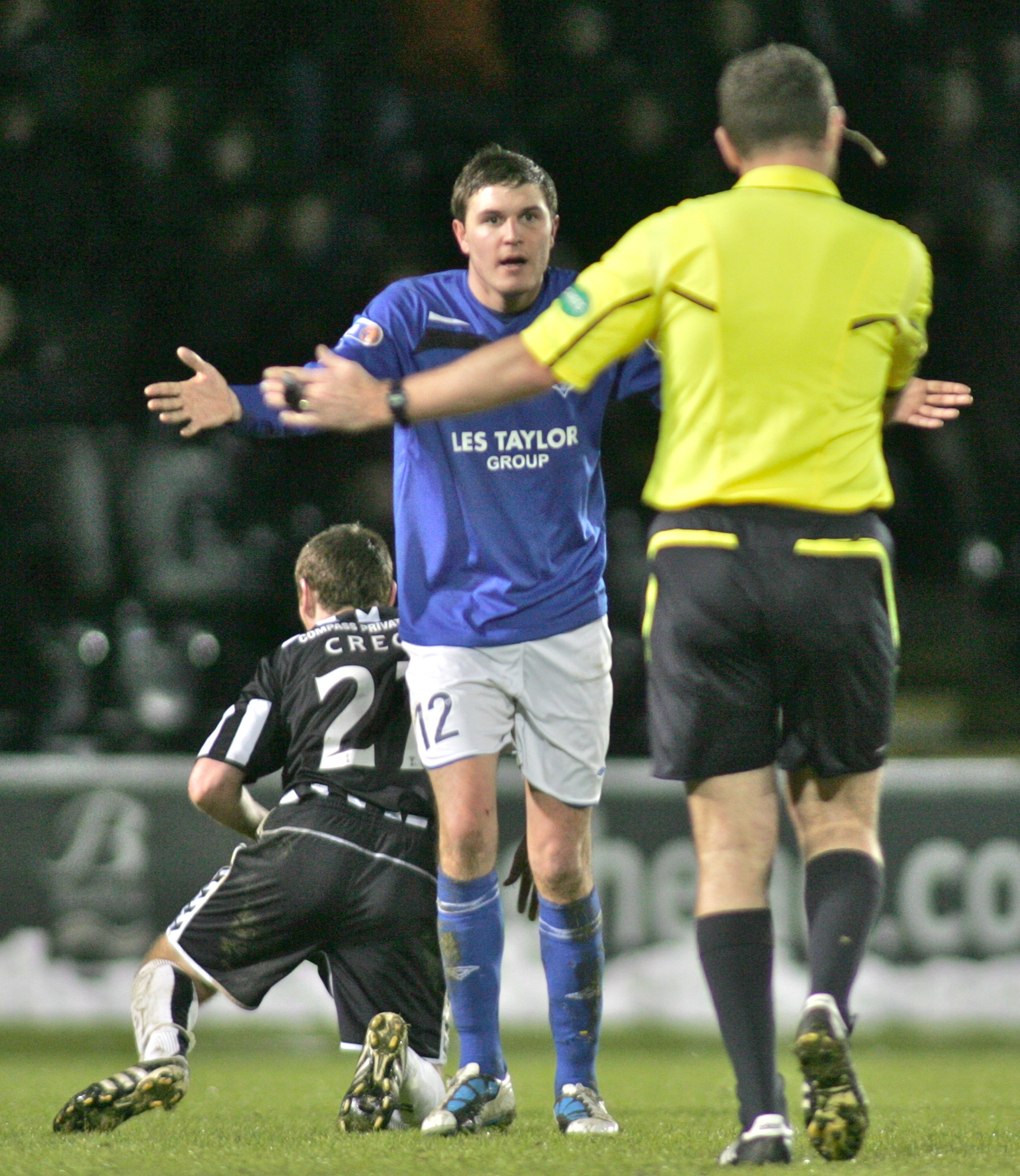 Paul Emslie, from St Mirren vs Peterhead